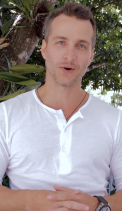 Albi De Abreu te invita a ver Recetas en 140